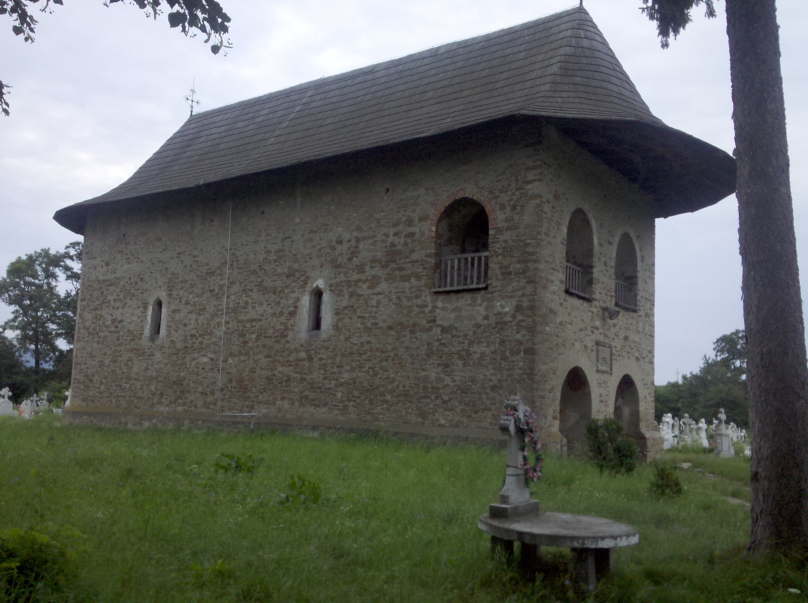 esglesia de Părhăuţi, Suceava